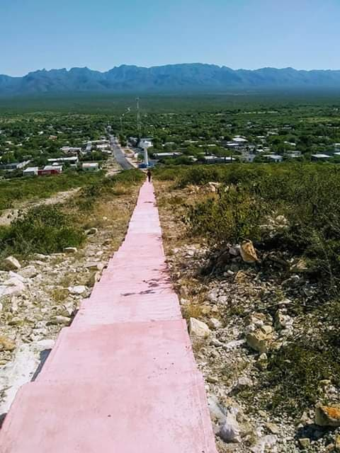 Una vista hacia la montaña caracteristica de Higueras y Cerralvo